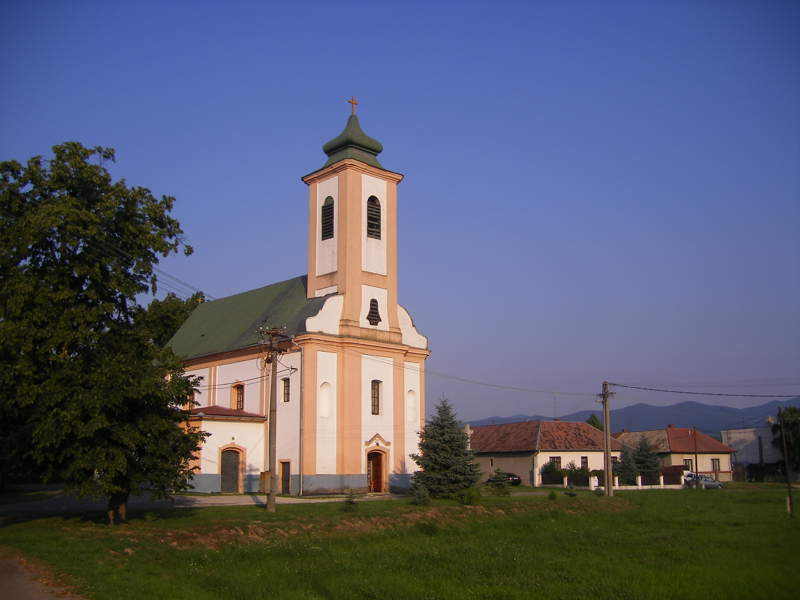 Ipolyszakállos - katolikus templom